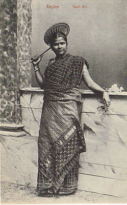 Ceylon Tamil Girl Circa 1910